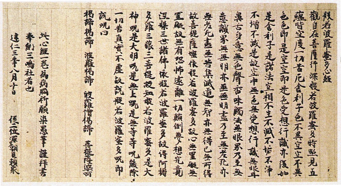 源頼家筆「般若波羅密多心経」静岡県三島大社所蔵。1203年9月16日、頼家が病の平癒を祈念して写経し静岡県の三嶋大社に奉納したもの。